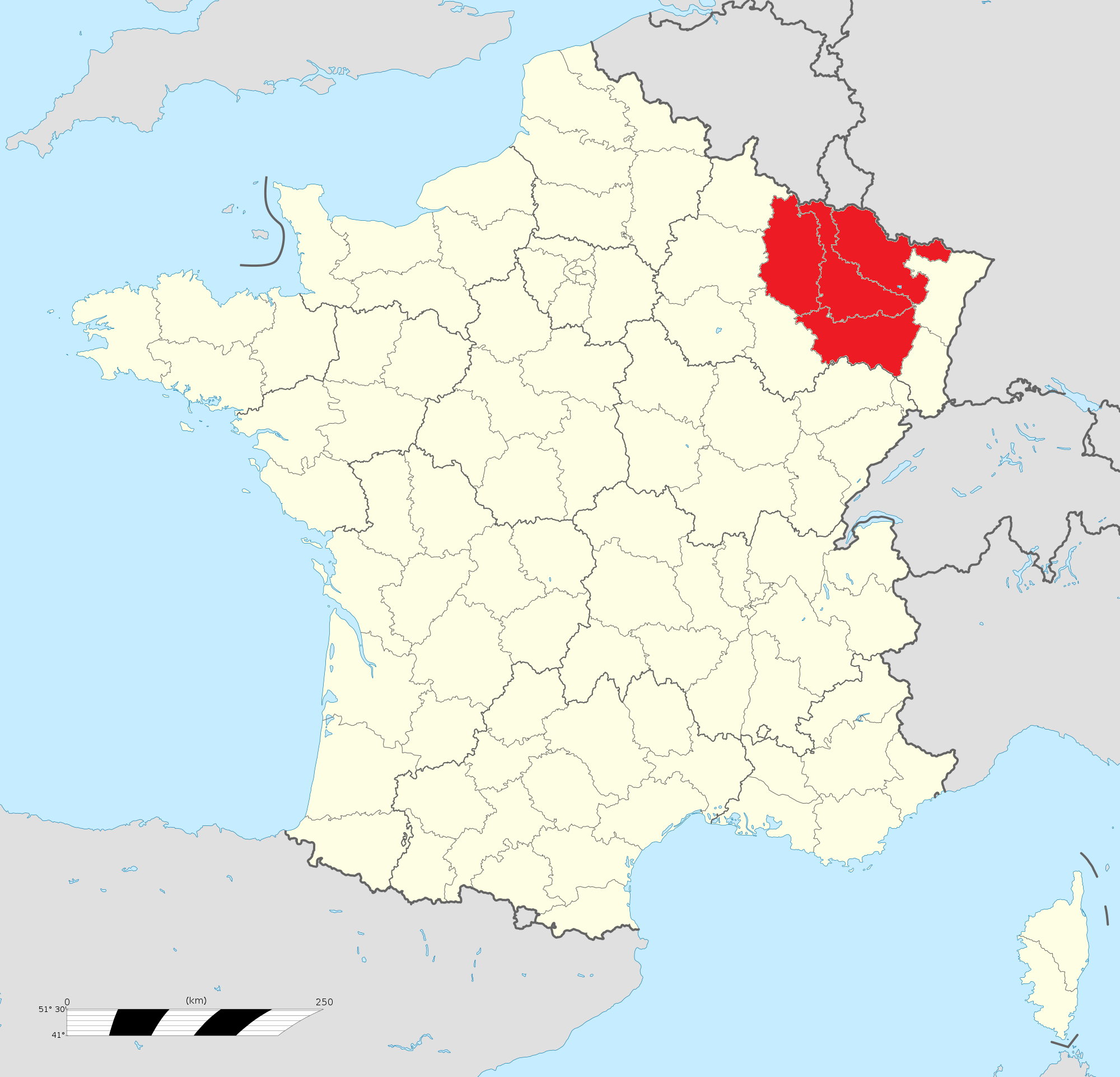 La Lorraine (départements de Meurthe et Moselle, Meuse, Moselle, Vosges).